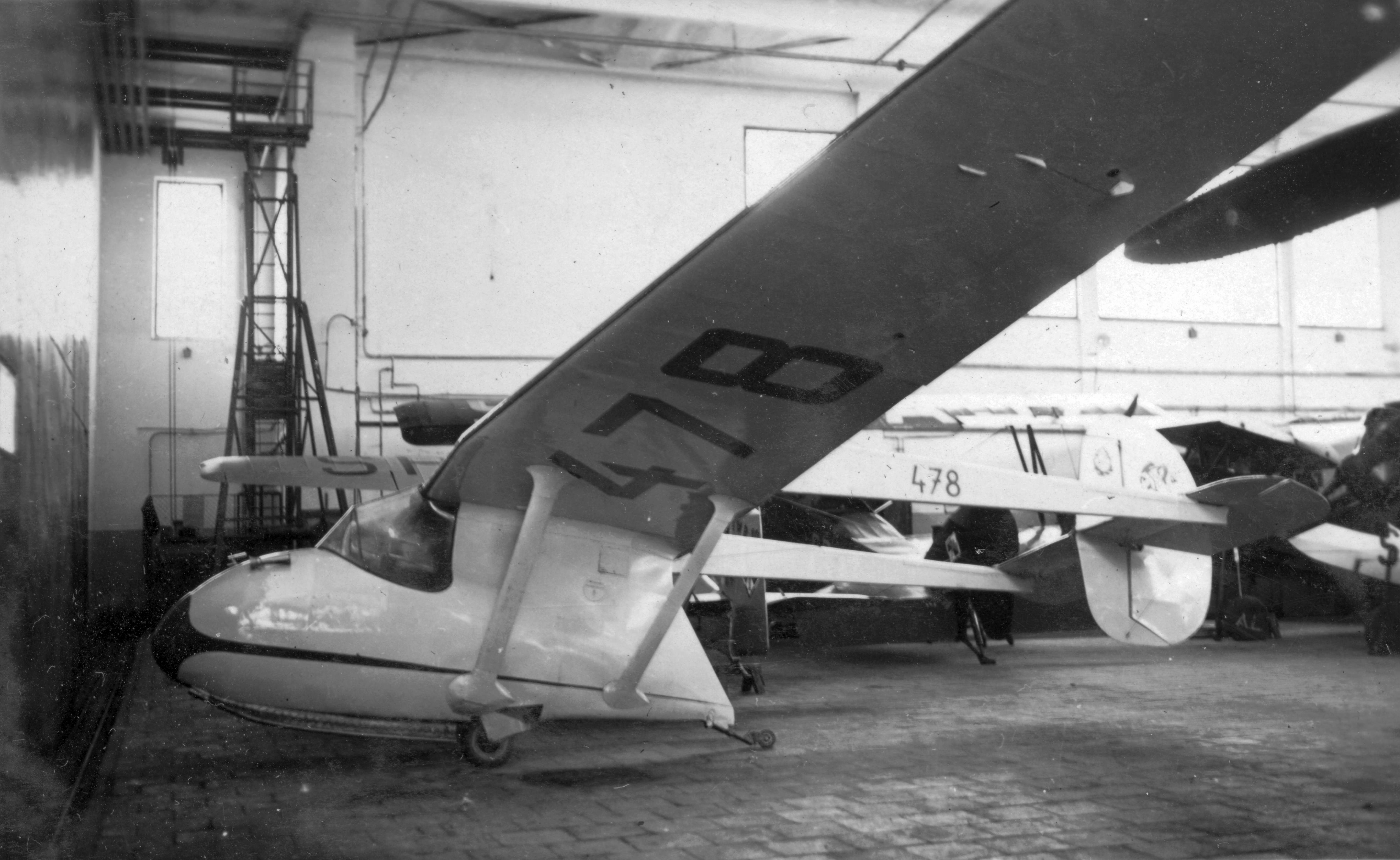 Wieslaw Stepniewski ITS-8 típusú segédmotoros vitorlázó repülőgépe. Location: Poland Tags: Polish brand, hangar, airport, sailplane Title: Wieslaw Stepniewski ITS-8 típusú segédmotoros vitorlázó repülőgépe.